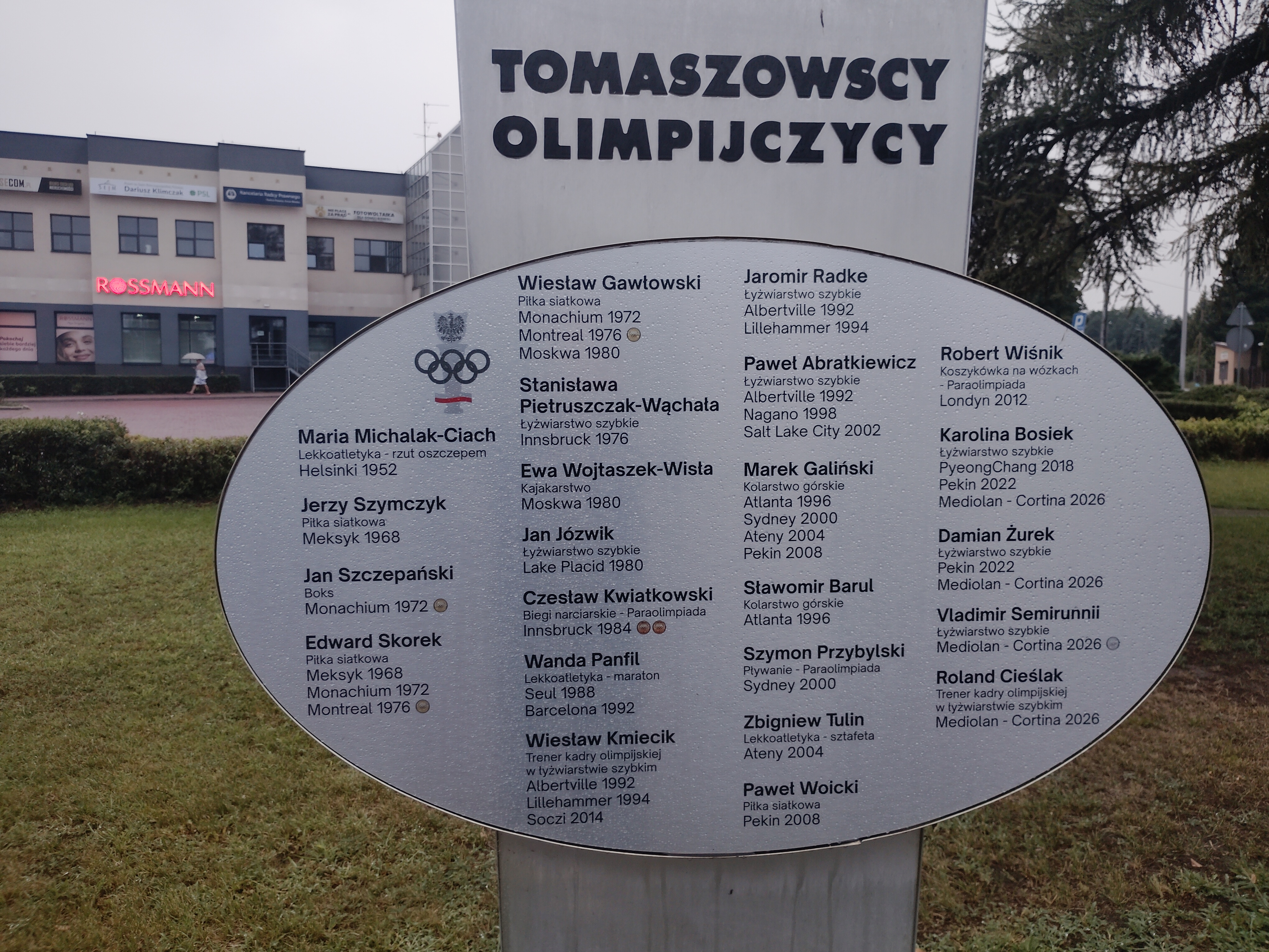 Tablica upamiętniająca Tomaszowskich Olimpijczyków, róg ulicy Wandy Panfil i ulicy Granicznej w Tomaszowie Mazowieckim